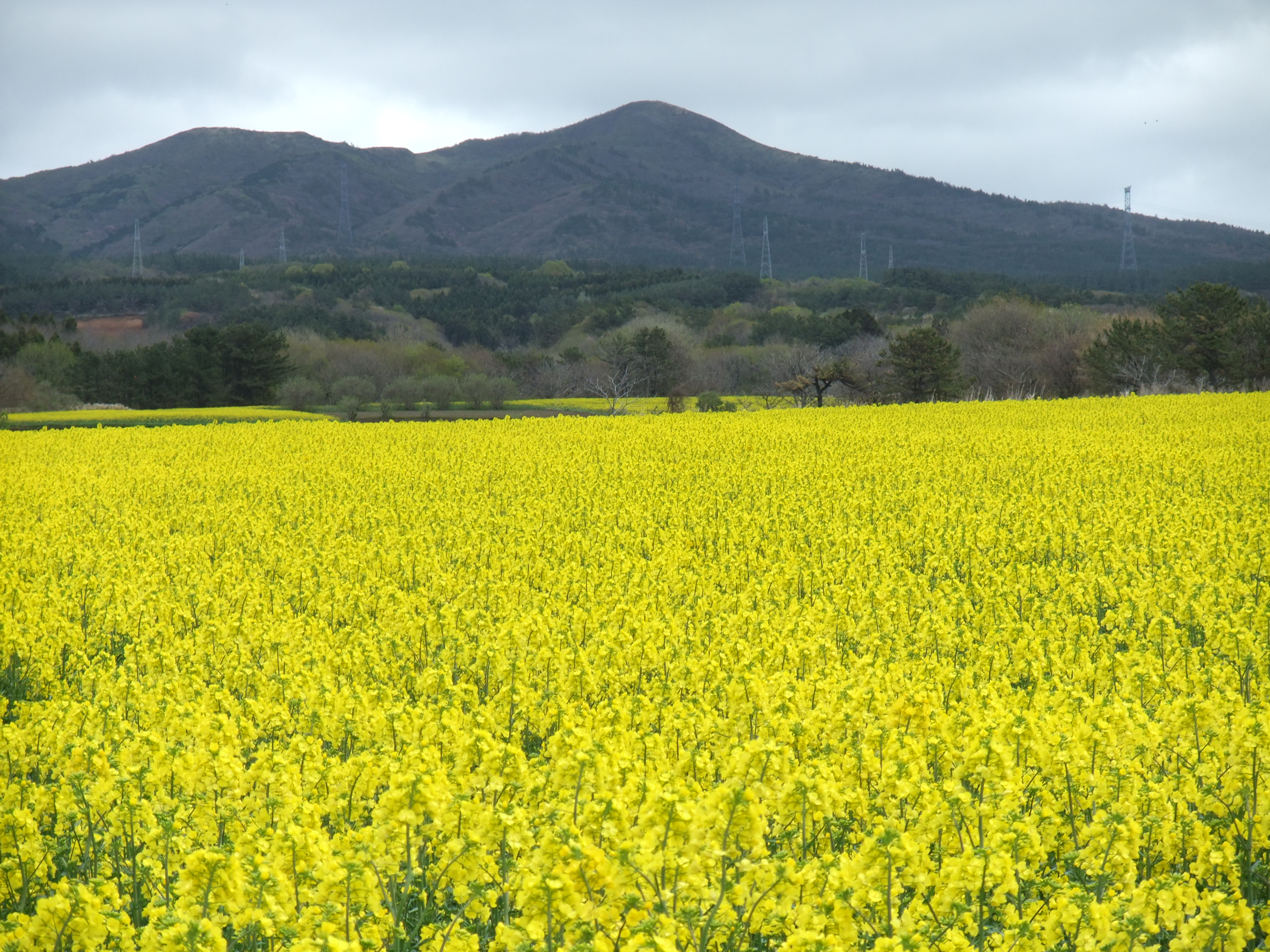 西方の菜の花畑から見る吹越烏帽子(ふっこしえぼし)